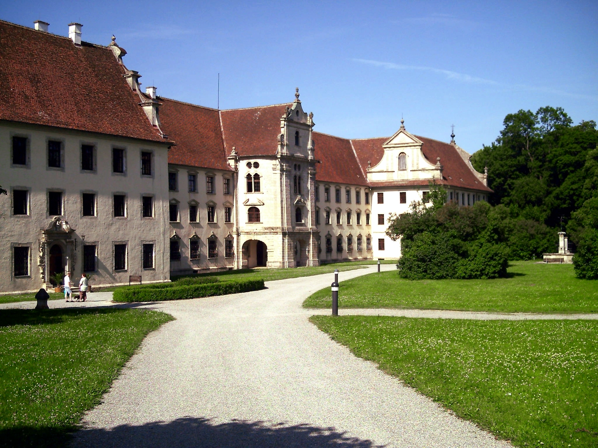 Außenansicht Kloster Obermarchtal, Alb-Donau Kreis, Baden-Württemberg, Deutschland